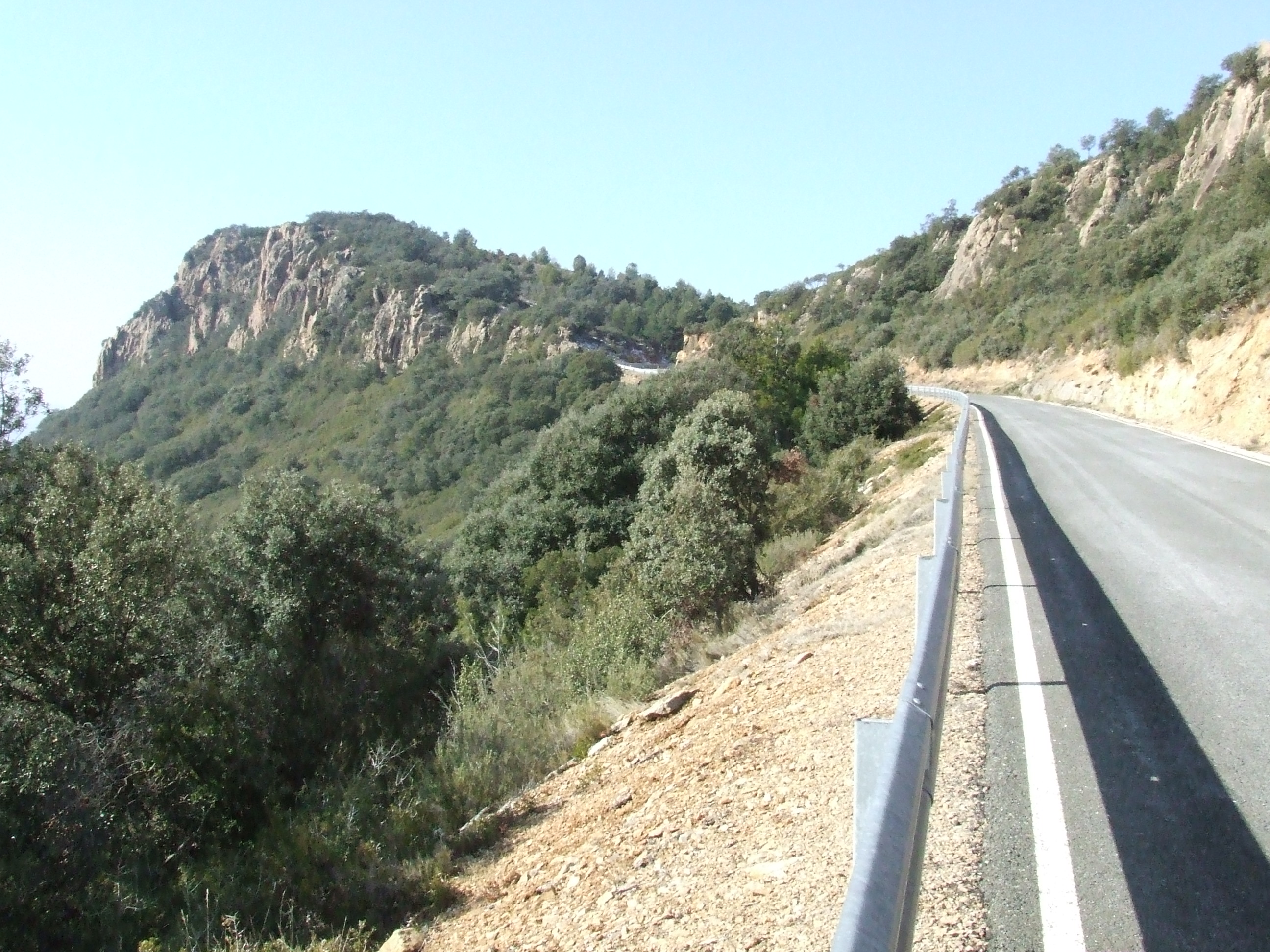 El Roc del Pas de Finestres, el Pas de Finestres i la carretera L-511 (Isona i Conca Dellà, Pallars Jussà)